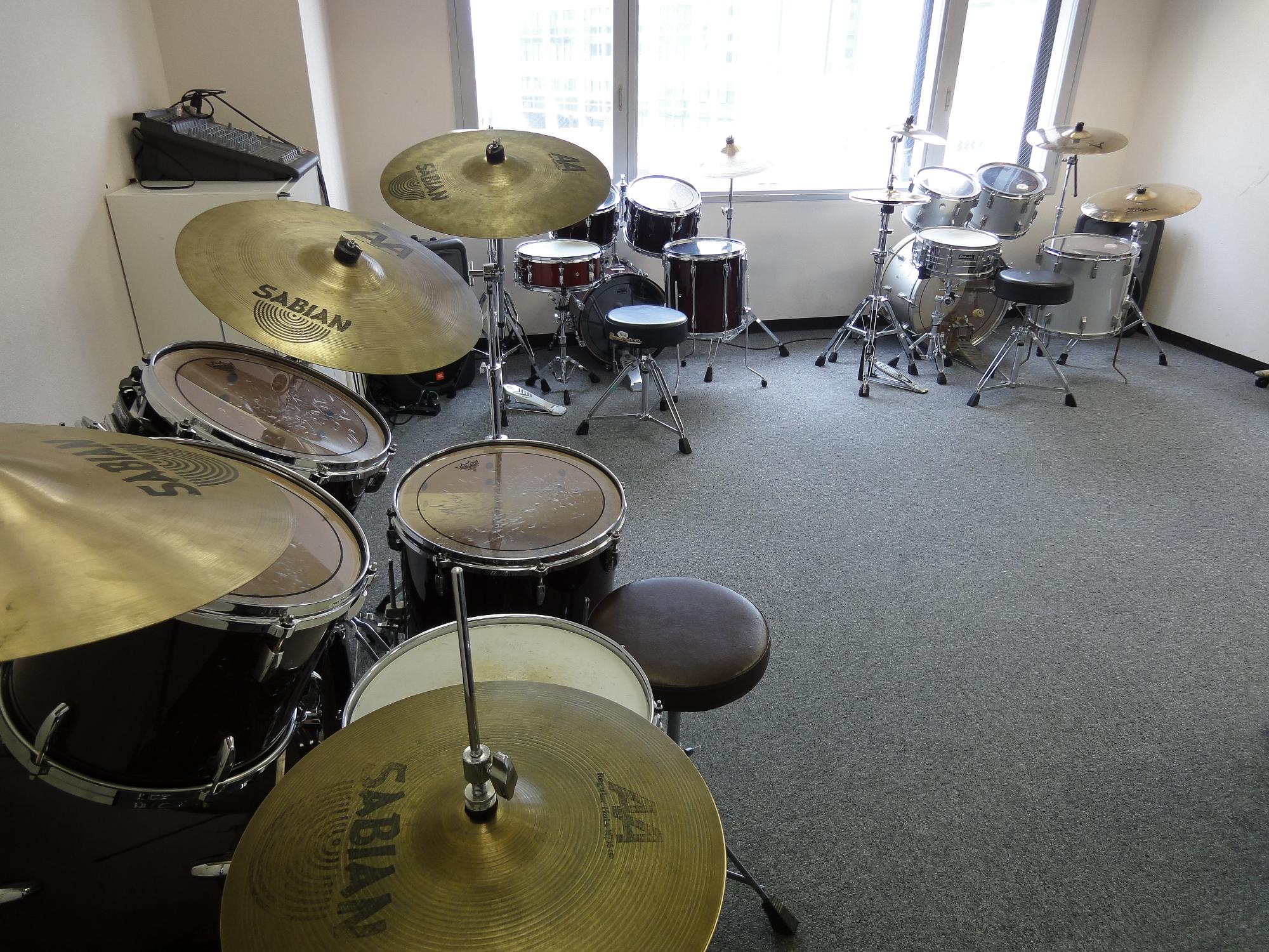 代官山音楽院ドラムテック工房